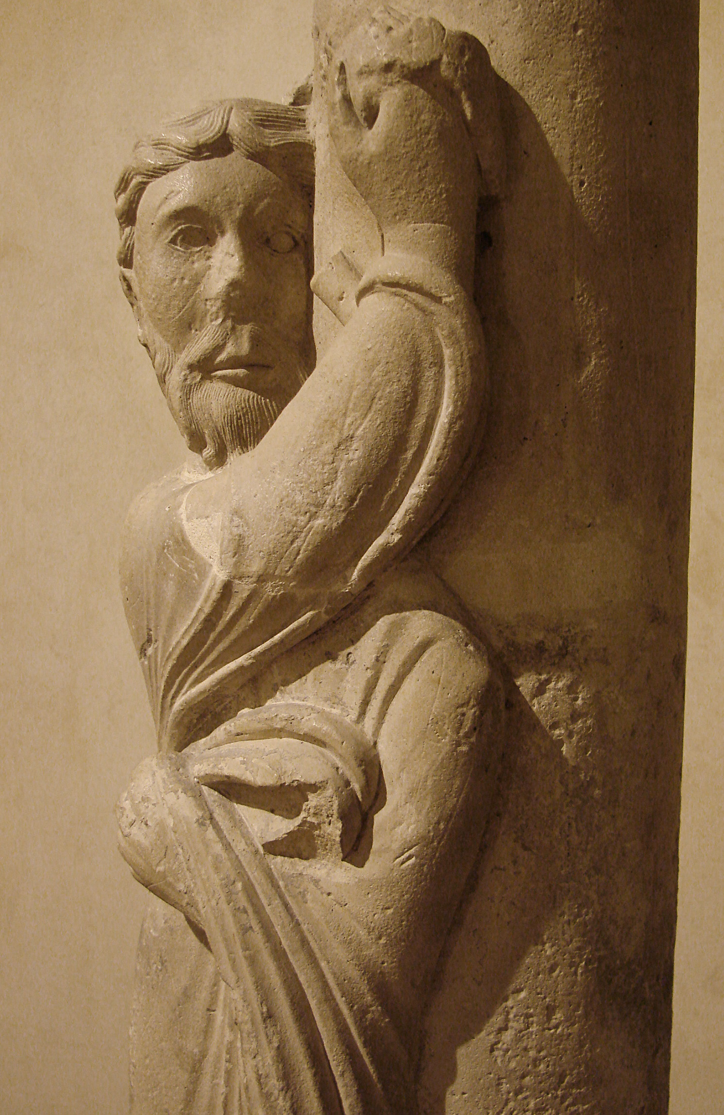 Statue-colonne de prophète tenant un phyactère du cloître de Notre-Dame-en-Vaux, 12ème siècle. Ce cloître roman, détruit en 1759, a été en partie reconstitué à partir des fragments retrouvés. Musée du cloître de Notre-Dame-en-Vaux, Châlons en Champagne (51), France.